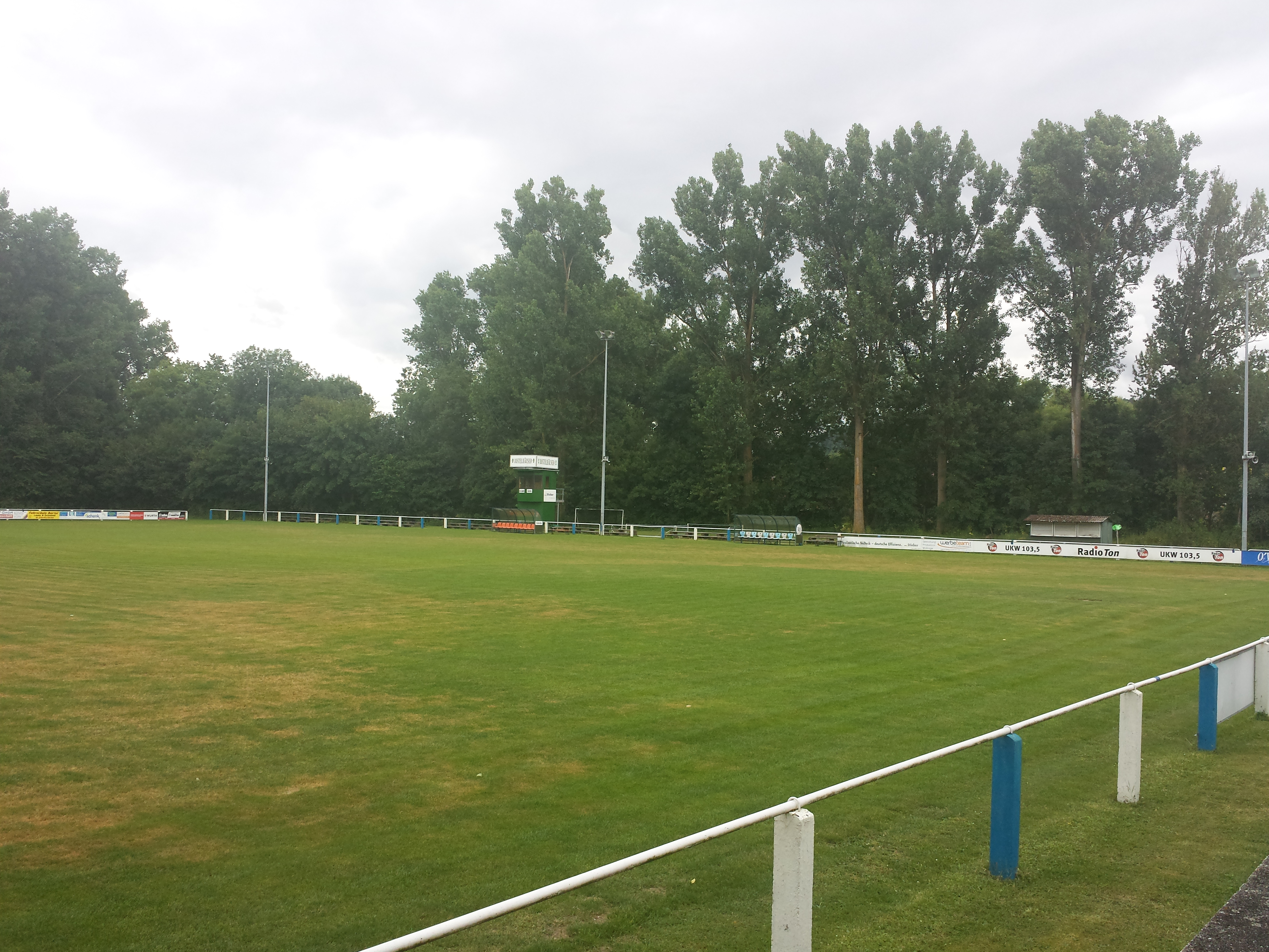 Das Sportplatz (Tauberstadion) des FV Lauda.